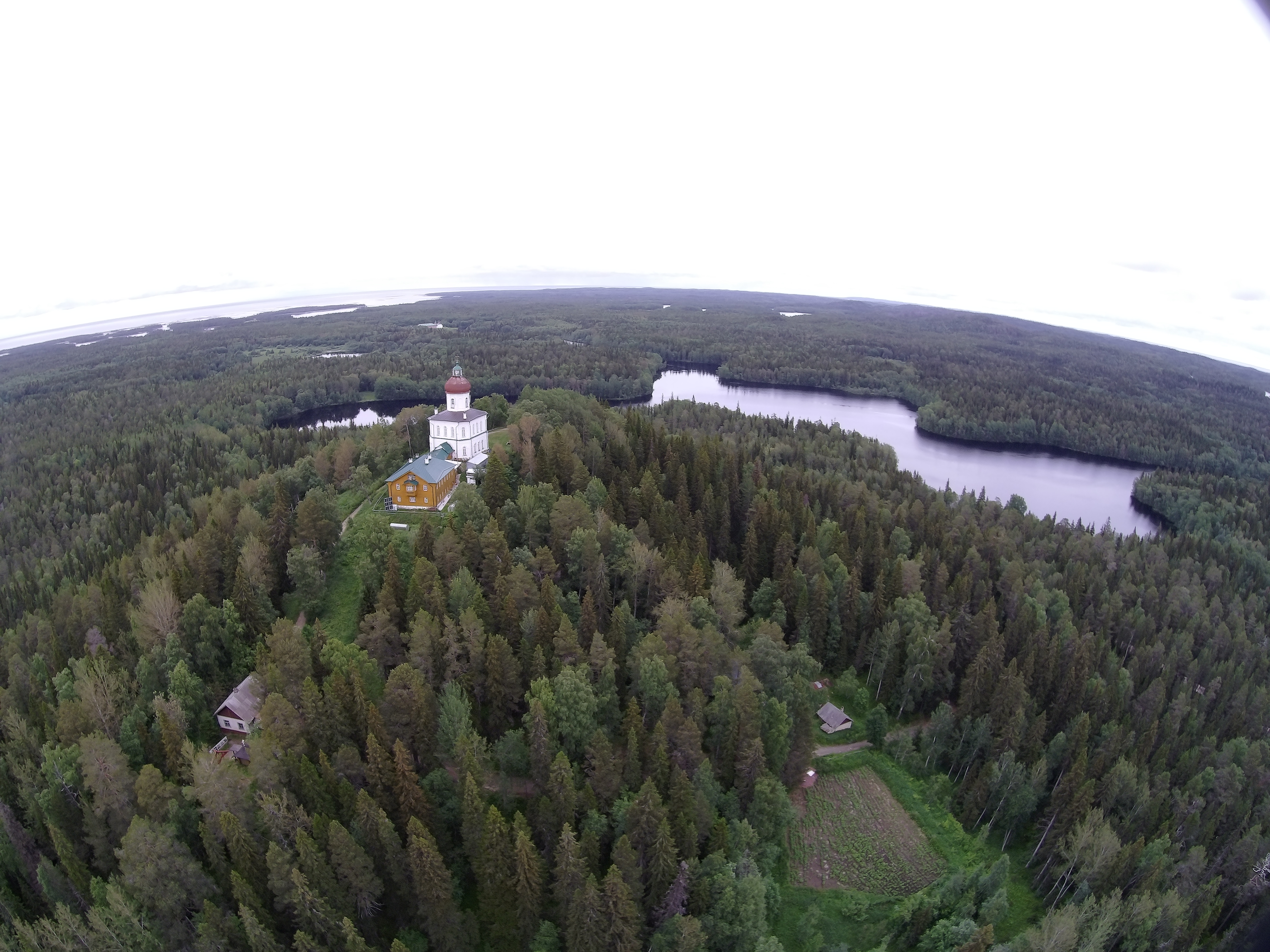 Letecký snímek poustevny